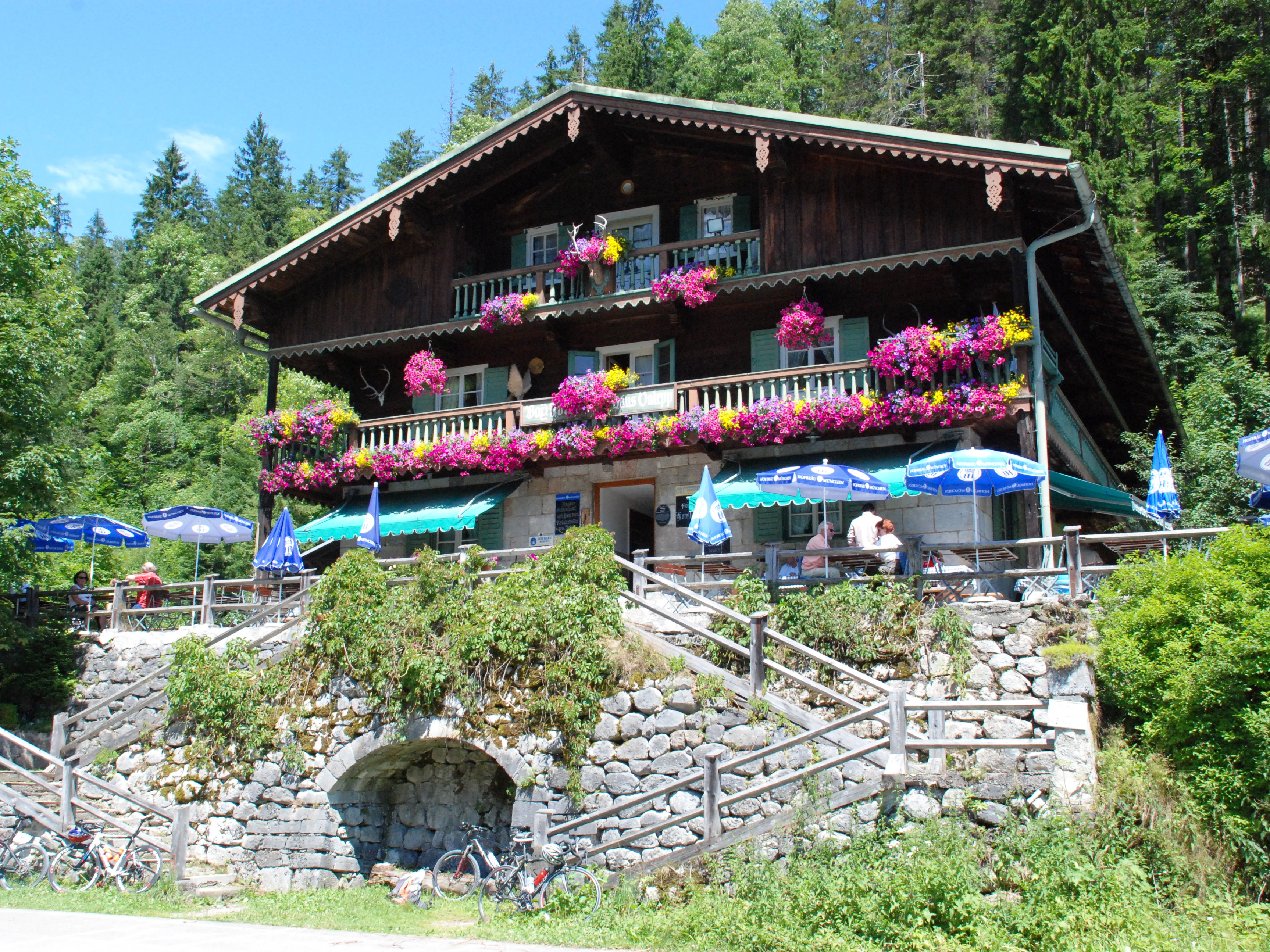 Ehemaliges Forsthaus Valepp, jetzt Ausflugsgaststätte in Schliersee, Landkreis Miesbach, Regierungsbezirk Oberbayern, Bayern. Als Baudenkmal in der Bayerischen Denkmalliste aufgeführt